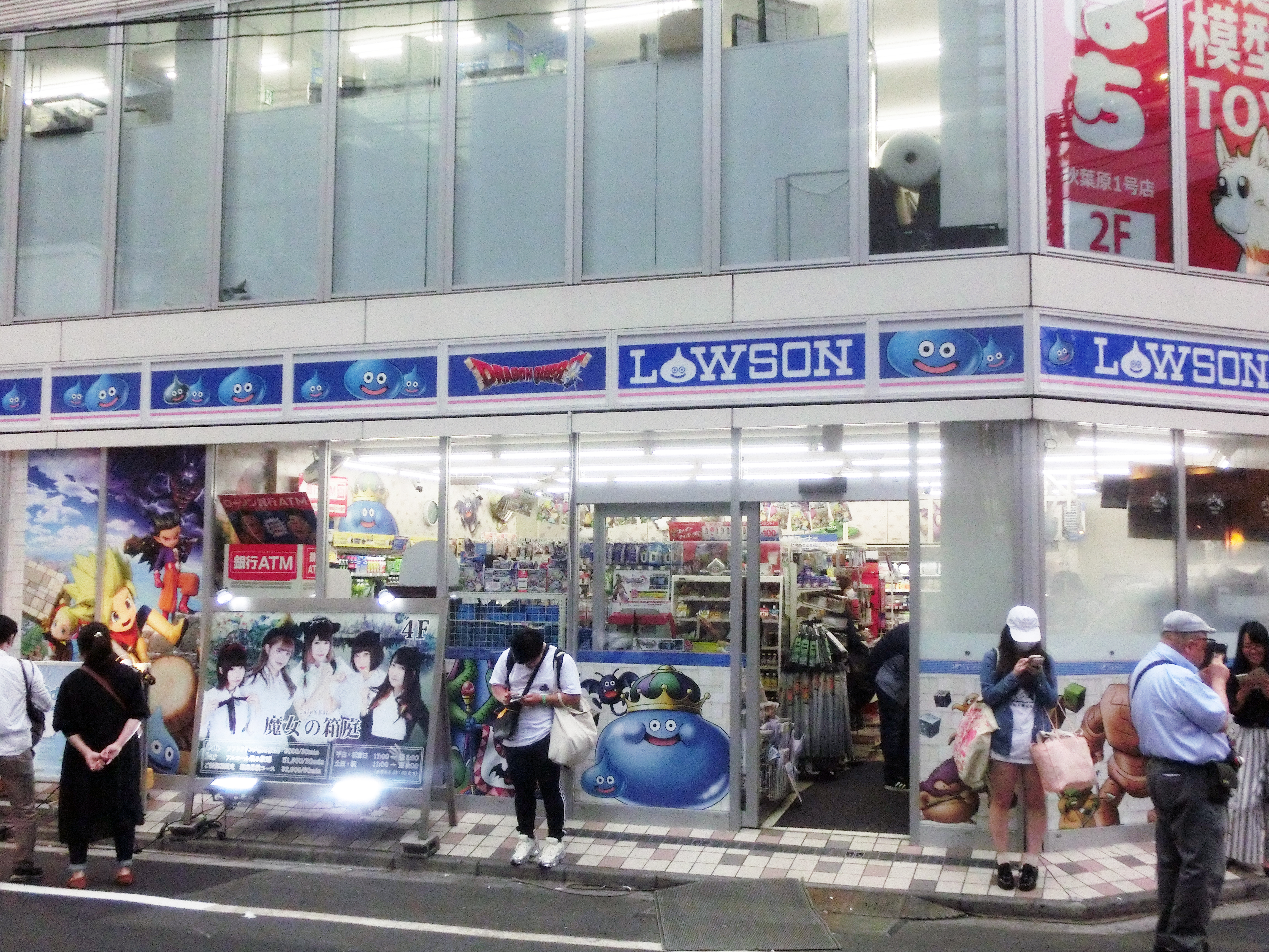 秋葉原 2019年